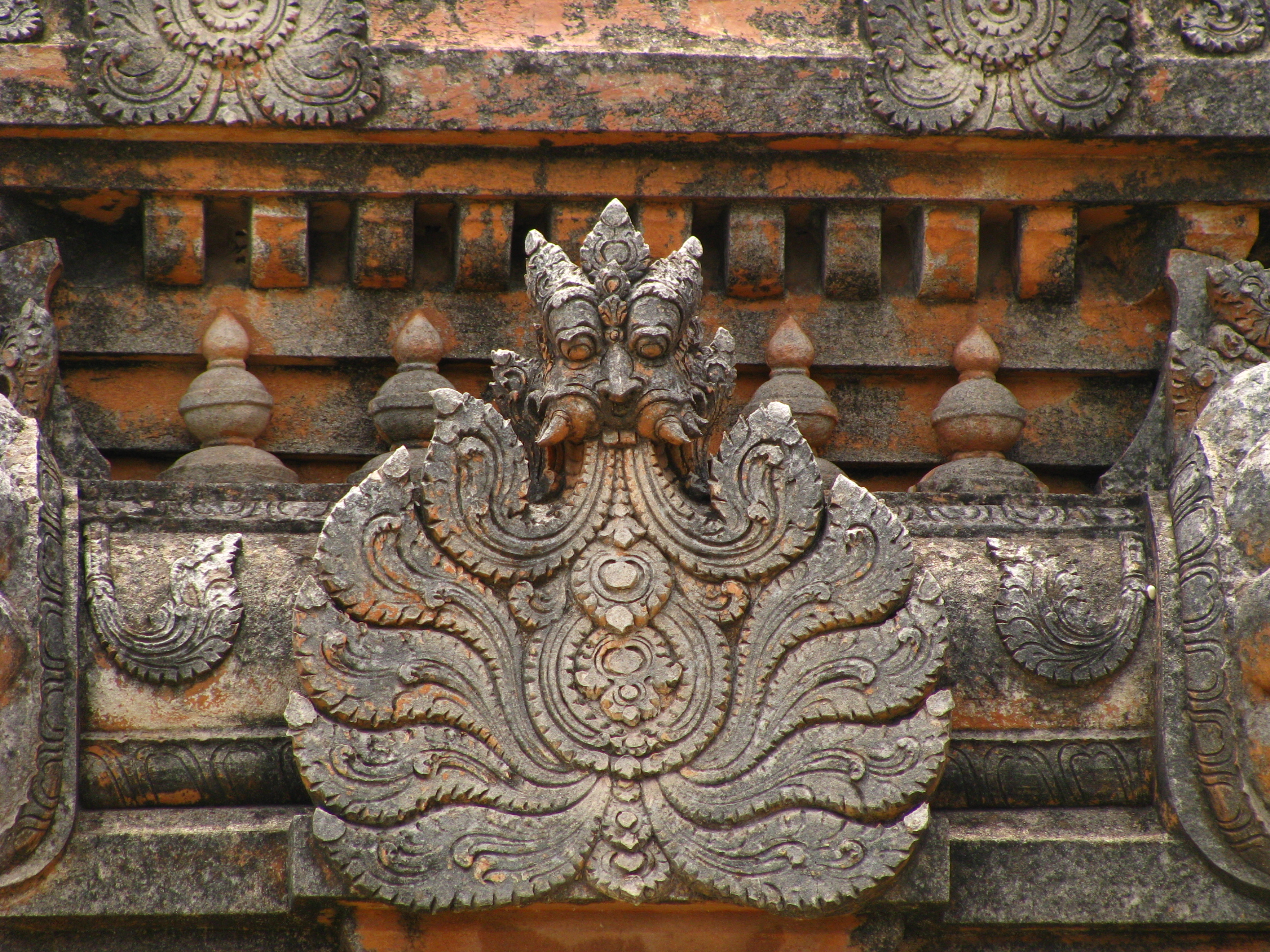 Makara carving at Krishna Temple, Hampi.